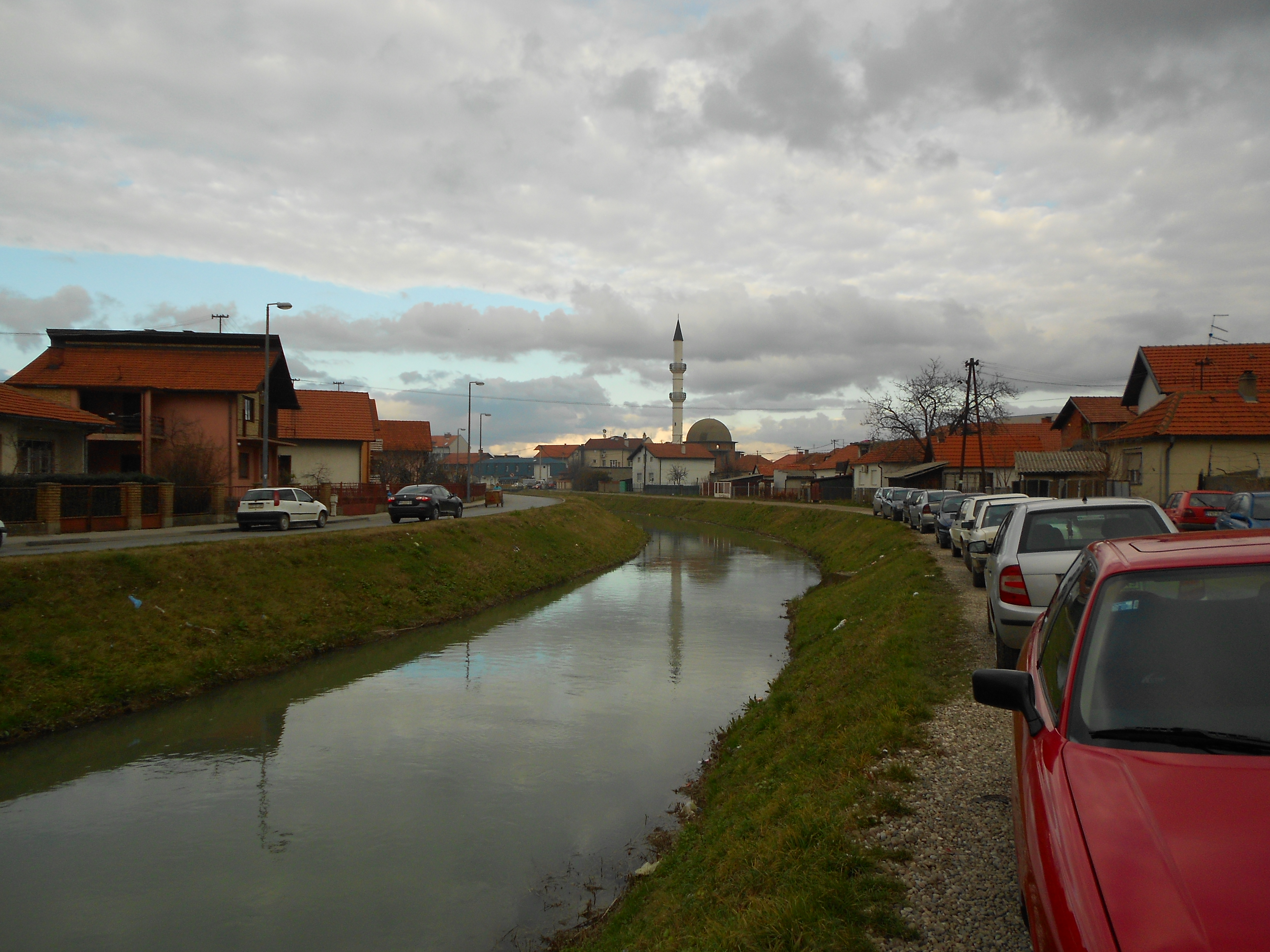 Канал Дашнице у Бијељини